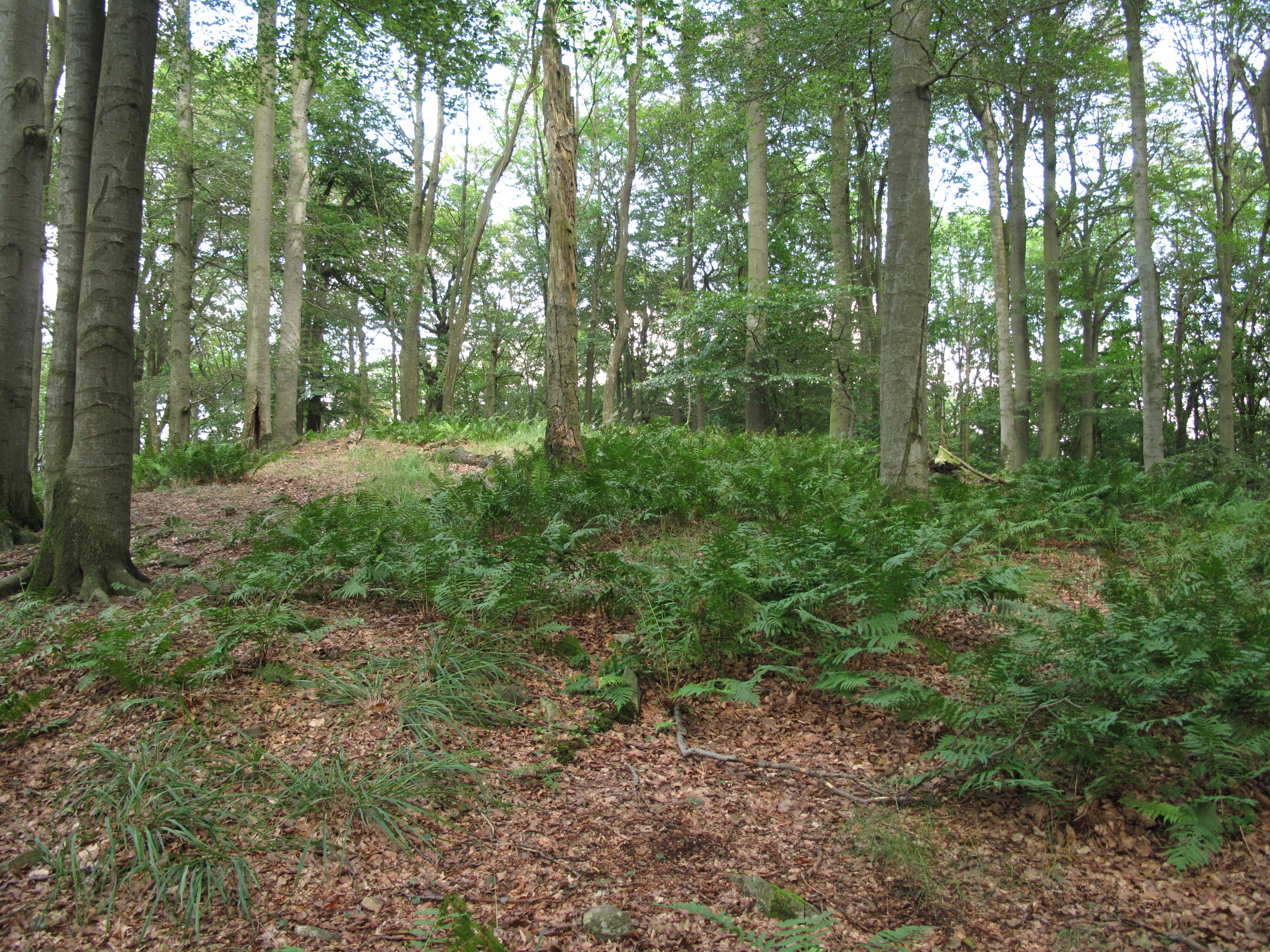 Přírodní památka Hora, okres Domažlice, Česká republika.